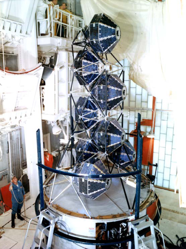 eight IDCSP (DSCS I) satellites